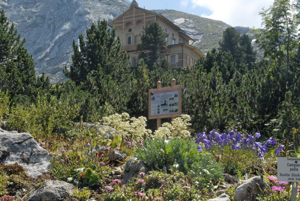 Schachen / Wetterstein, Alpengarten